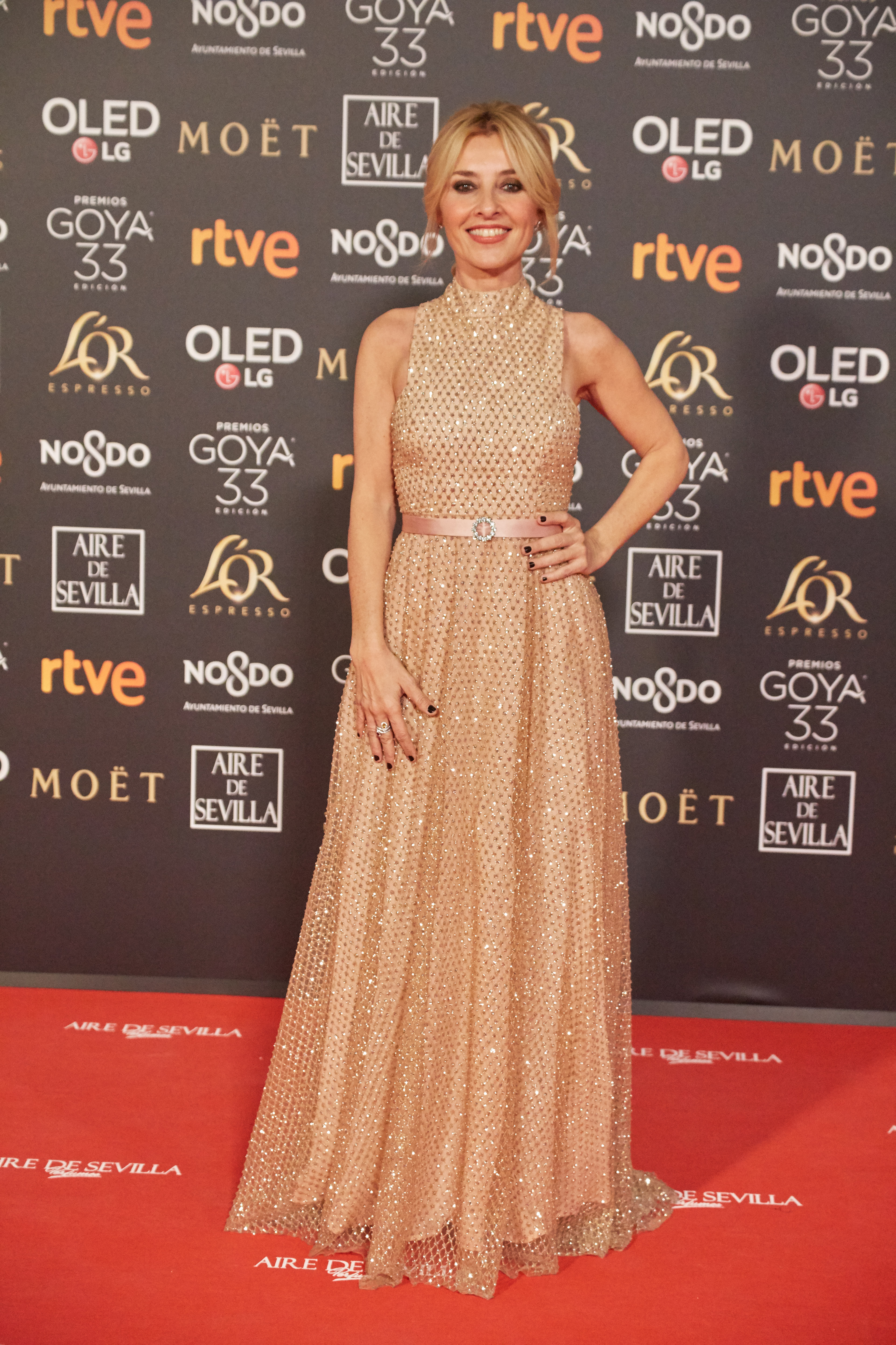 Cayetana Guilllén Cuervo en la alfombra roja de los Premios Goya celebrados en Sevilla en Febrero 2019